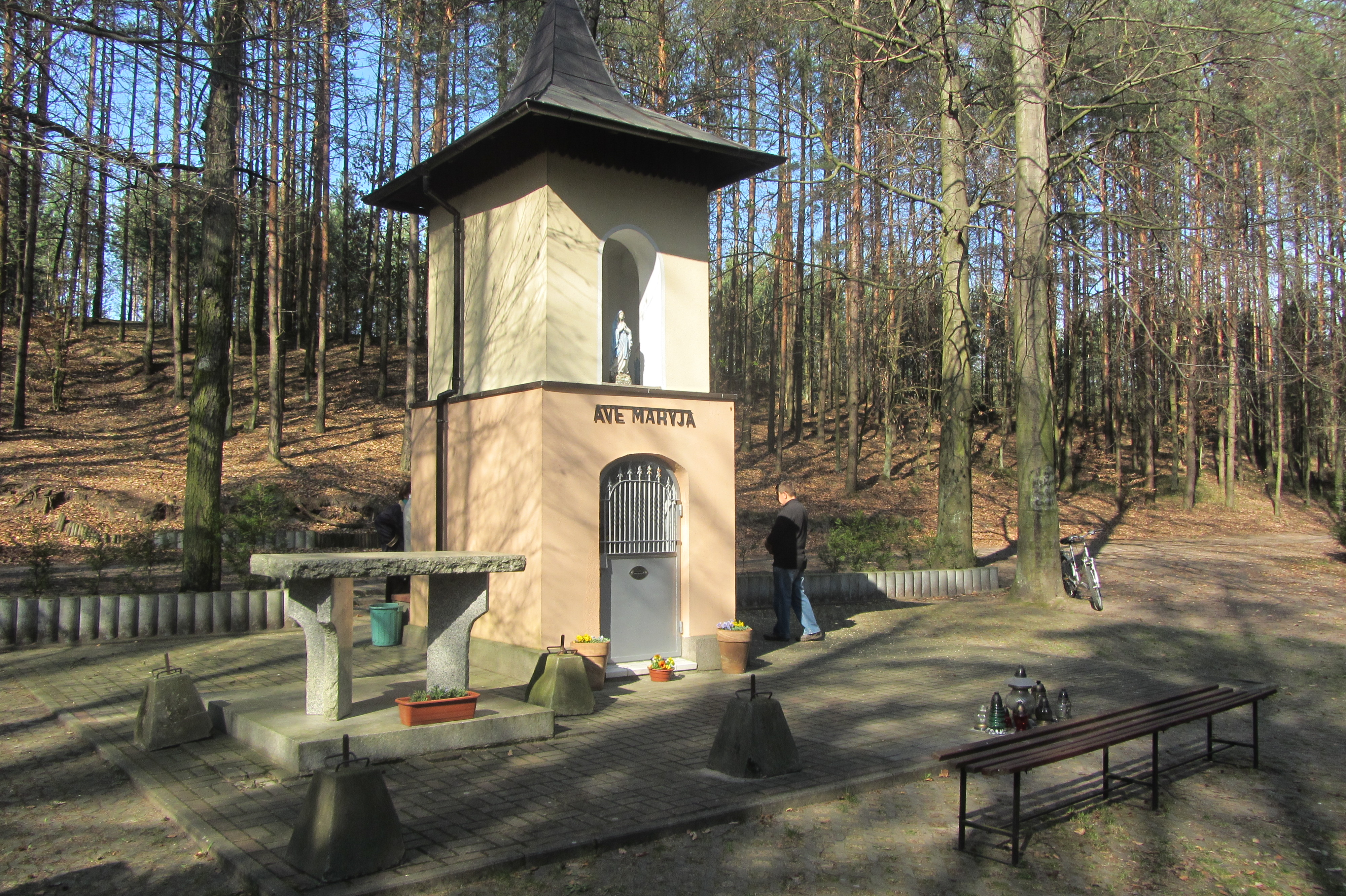 Heilquelle mit der Kapelle Studzionka